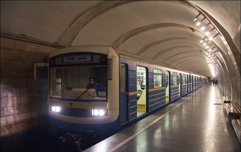 Вагон метро "Славутич"